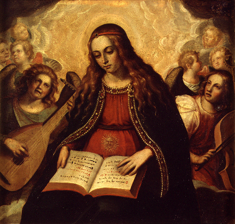 La obra representa a la Virgen de la Esperanza acompañada por unos ángeles que portan instrumentos musicales.